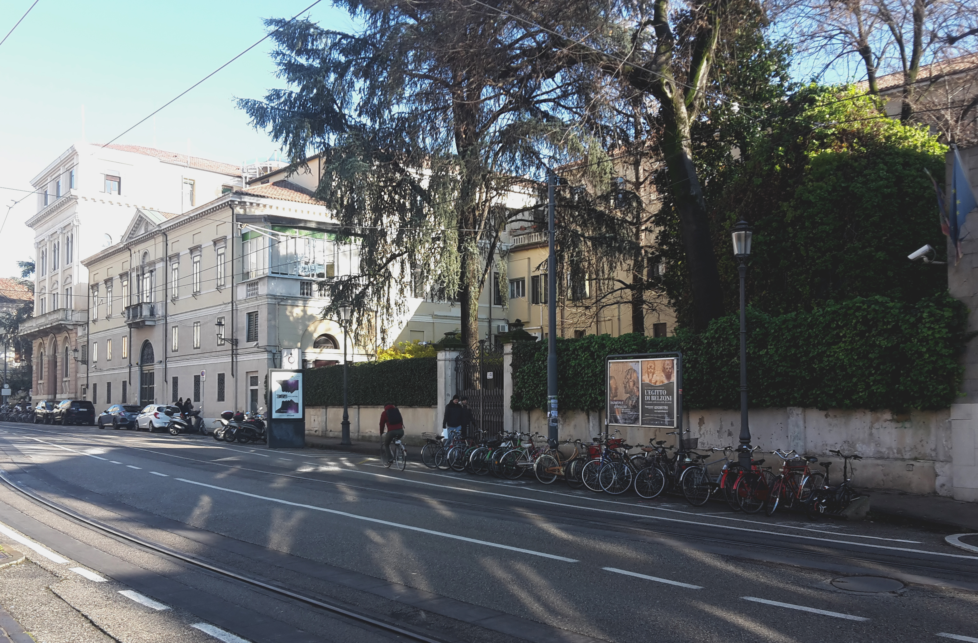 Palazzo Santo Stefano, Padova. Il fronte lungo riviera Tito Livio. Al centro della foto, l'Appartamento di Rappresentanza della Prefettura; in primo piano, nascosto dall'edera, il rifugio antiaereo costruito nel 1944.